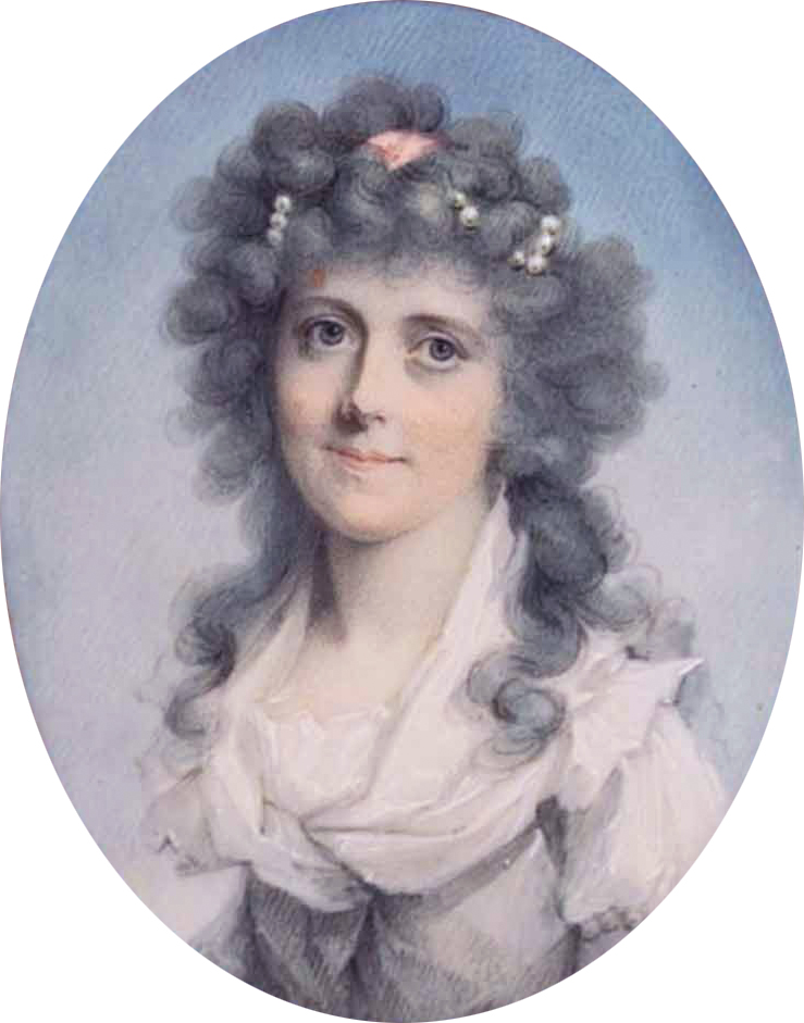 Sarah Garrow, née Dore (d. 1808) engraved (verso) 'Sarah Garrow Obt. 30th June, 1808. AEt 56.'